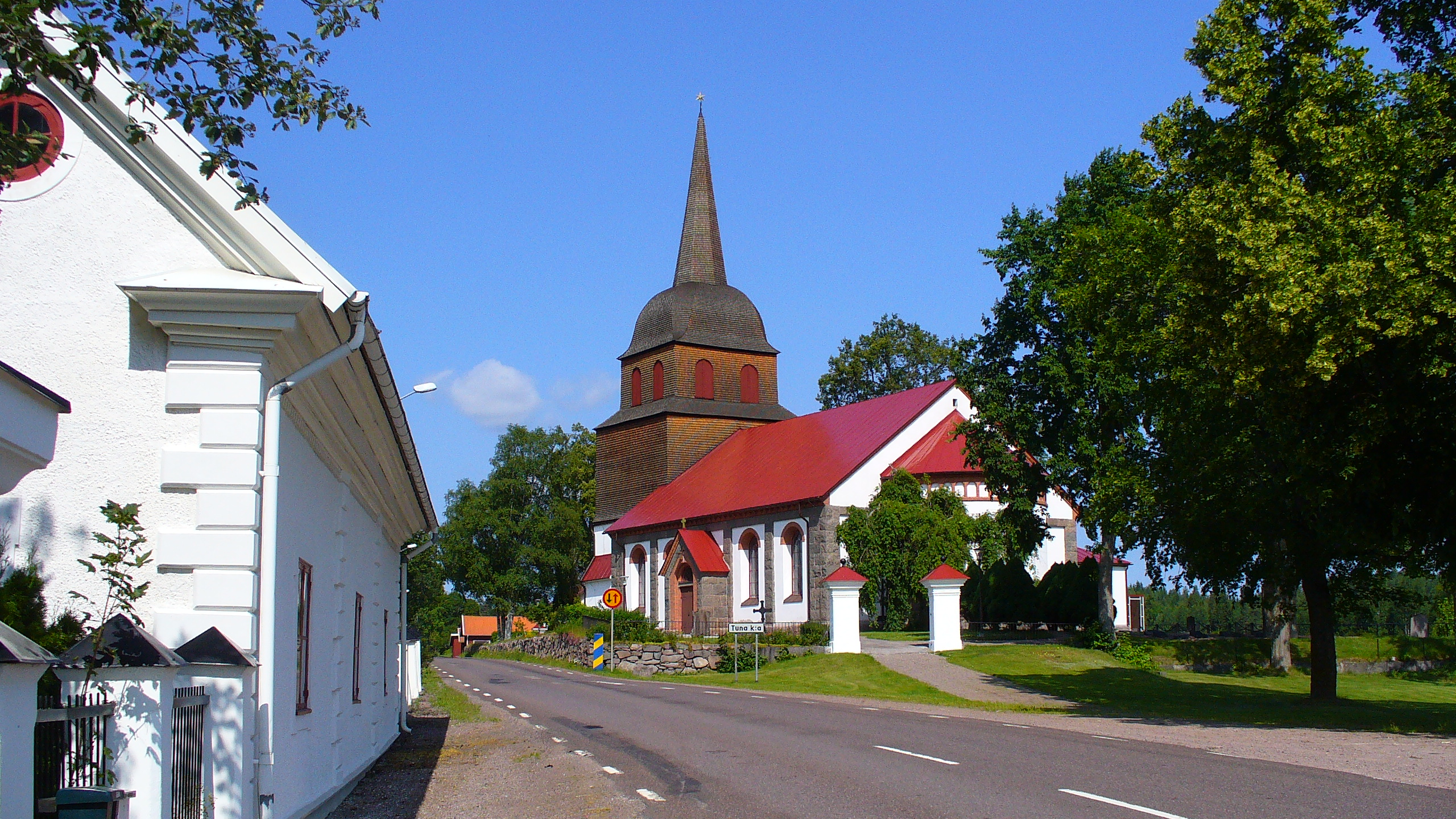 Chiesa di Tuna, comune di Vimmerby